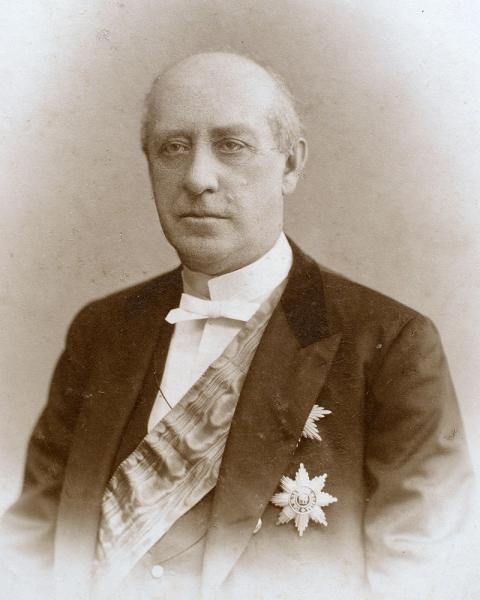 Нечаев-Мальцов, Юрий Степанович